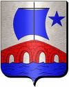 Blason de Pont de Veyle